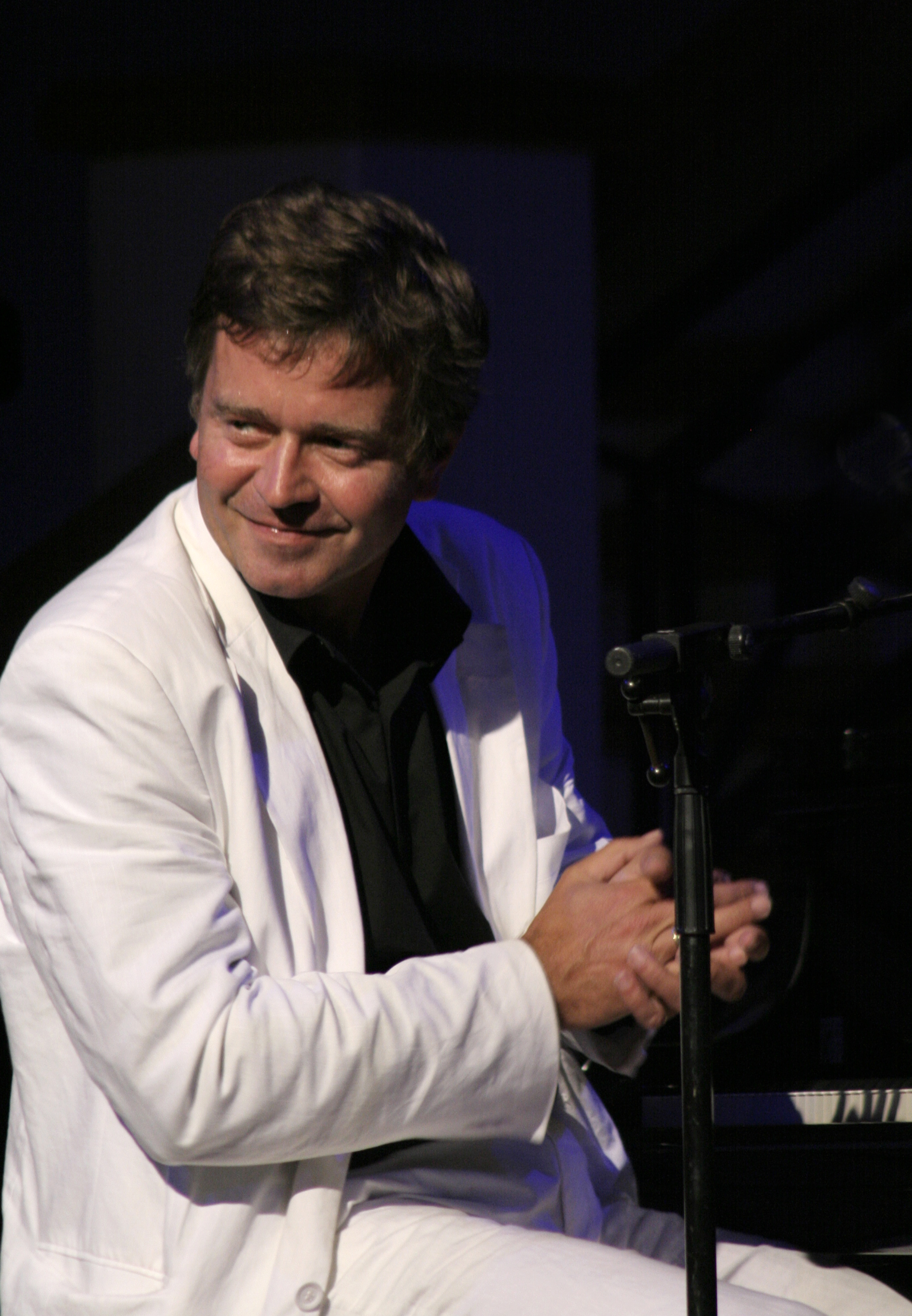 Michael Pewny